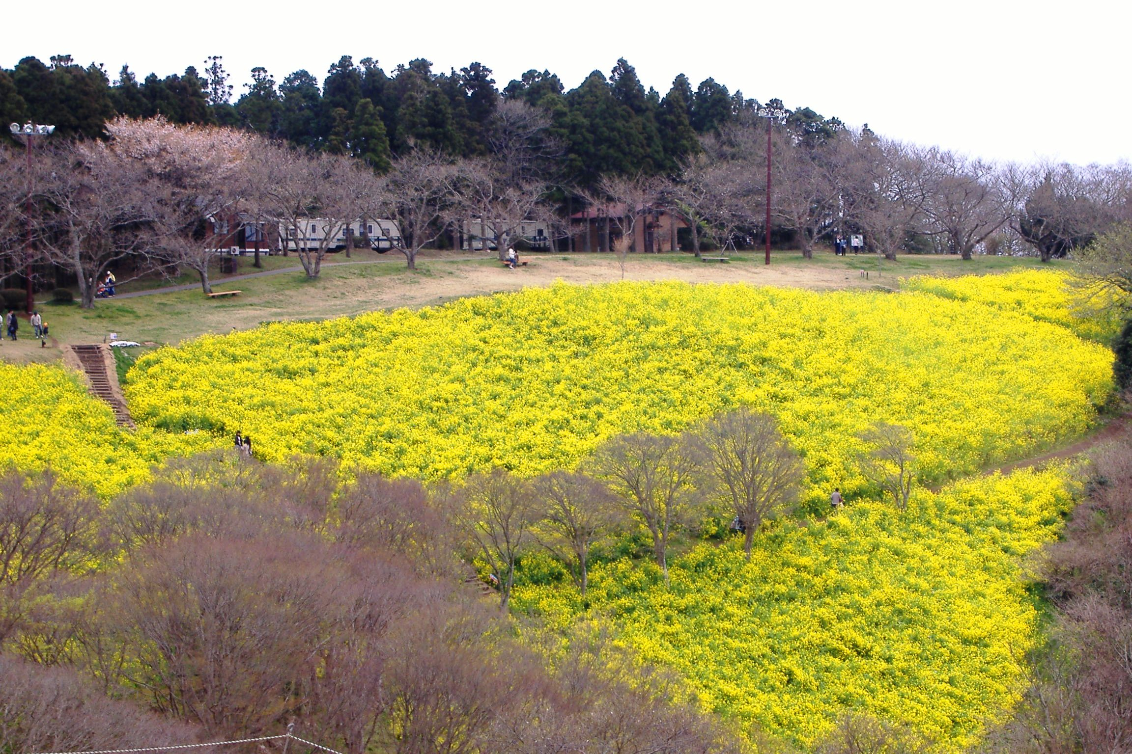 マザー牧場の菜の花畑